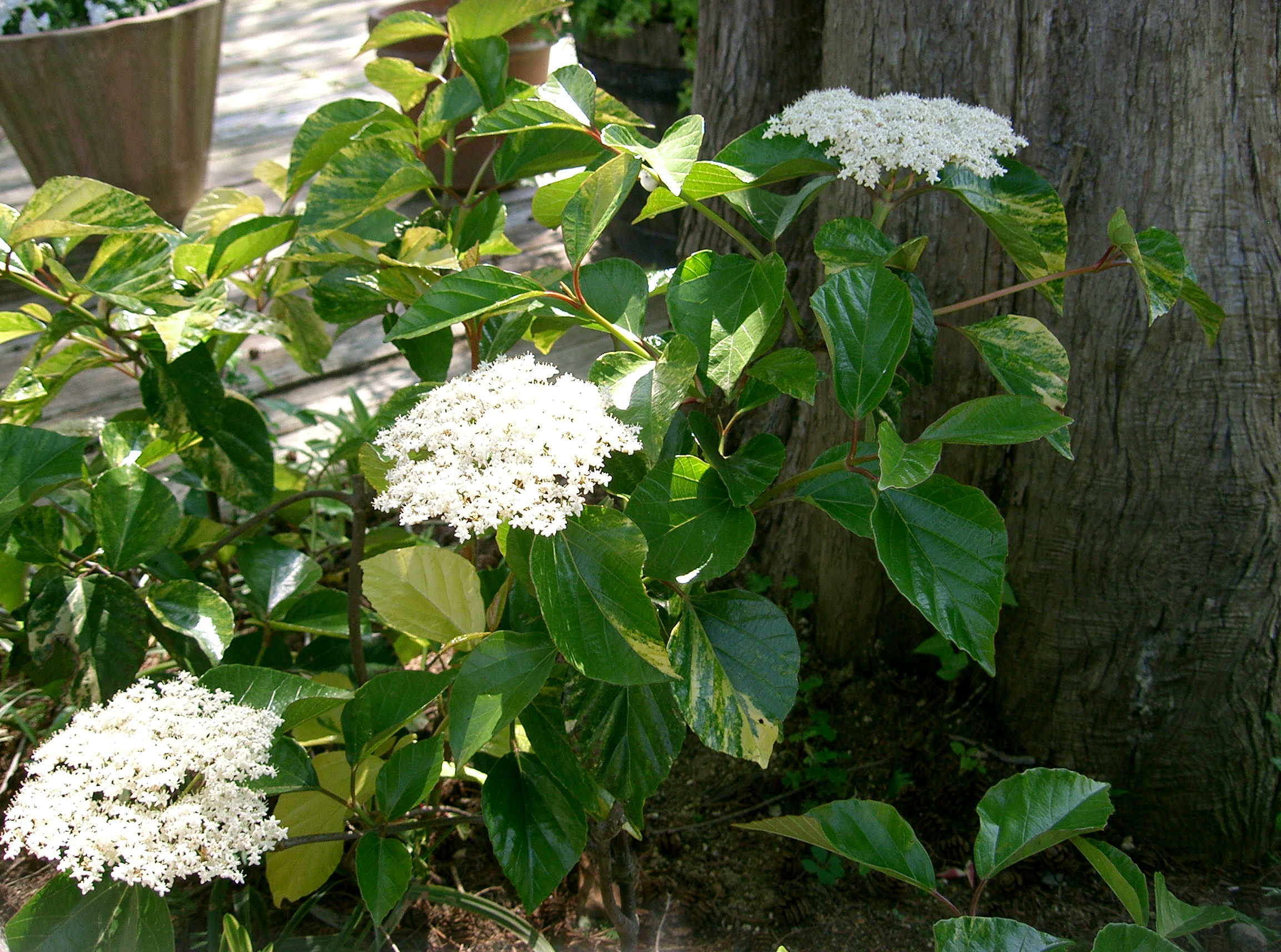 Scientific name Viburnum japonicum Cv.